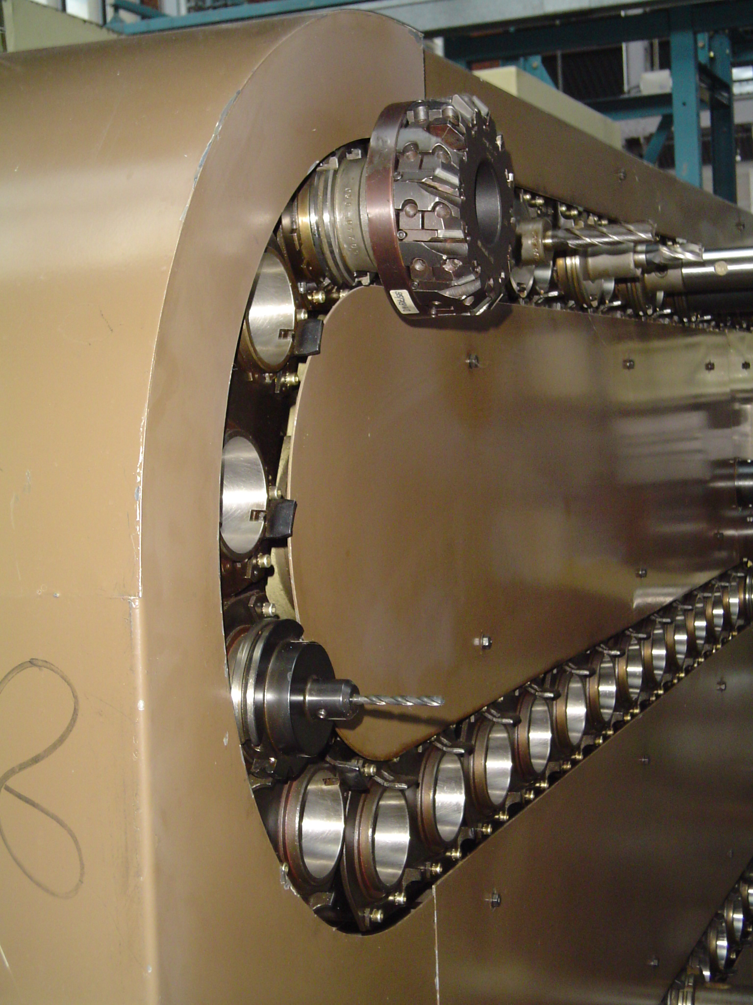 Aufgenommen im Sächsischen Industriemuseum Chemnitz VE Werkzeugmaschinenkombinat "Fritz Heckert" 1989 FMS 630 mit Lochstreifensteuerung